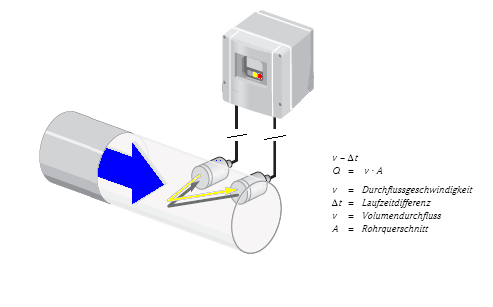 Ultraschall Durchflussmesser (Messstelle)